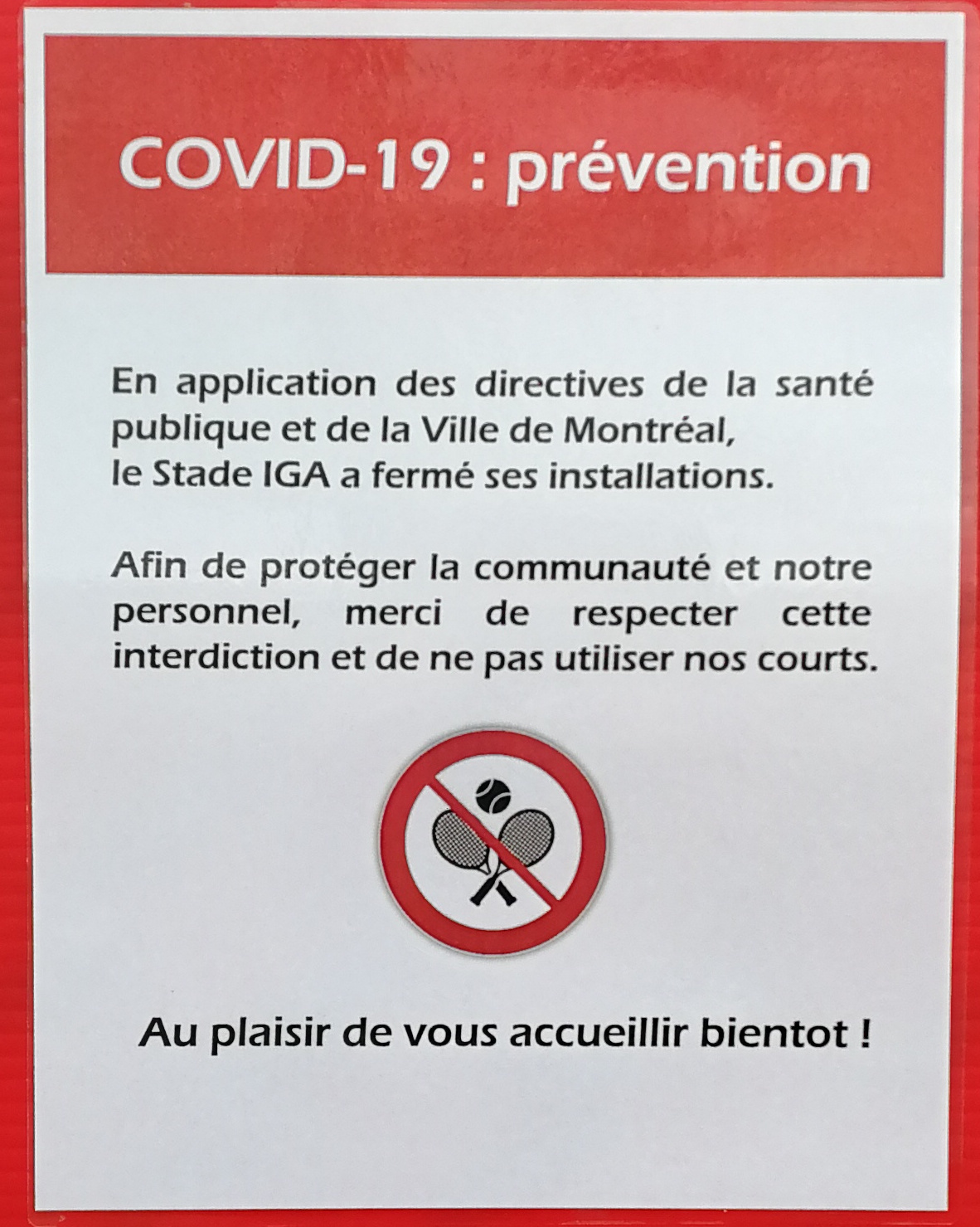 Affiche du placardée sur les clôtures du court Banque Nationale indiquant la fermeture de leurs installations en raison de la COVID-19. Le texte sur l'affiche indique: « COVID-19 : prévention En application des directives de la santé publique et de la Ville de Montréal, le Stade IGA a fermé ses installations. Afin de protéger la communauté et notre personnel, merci de respecter cette interdiction et de ne pas utiliser nos courts. (Pictogramme avec deux raquettes et une balle de tennis dans un cercle rouge barré) Au plaisir de vous accueillir bientôt ! »